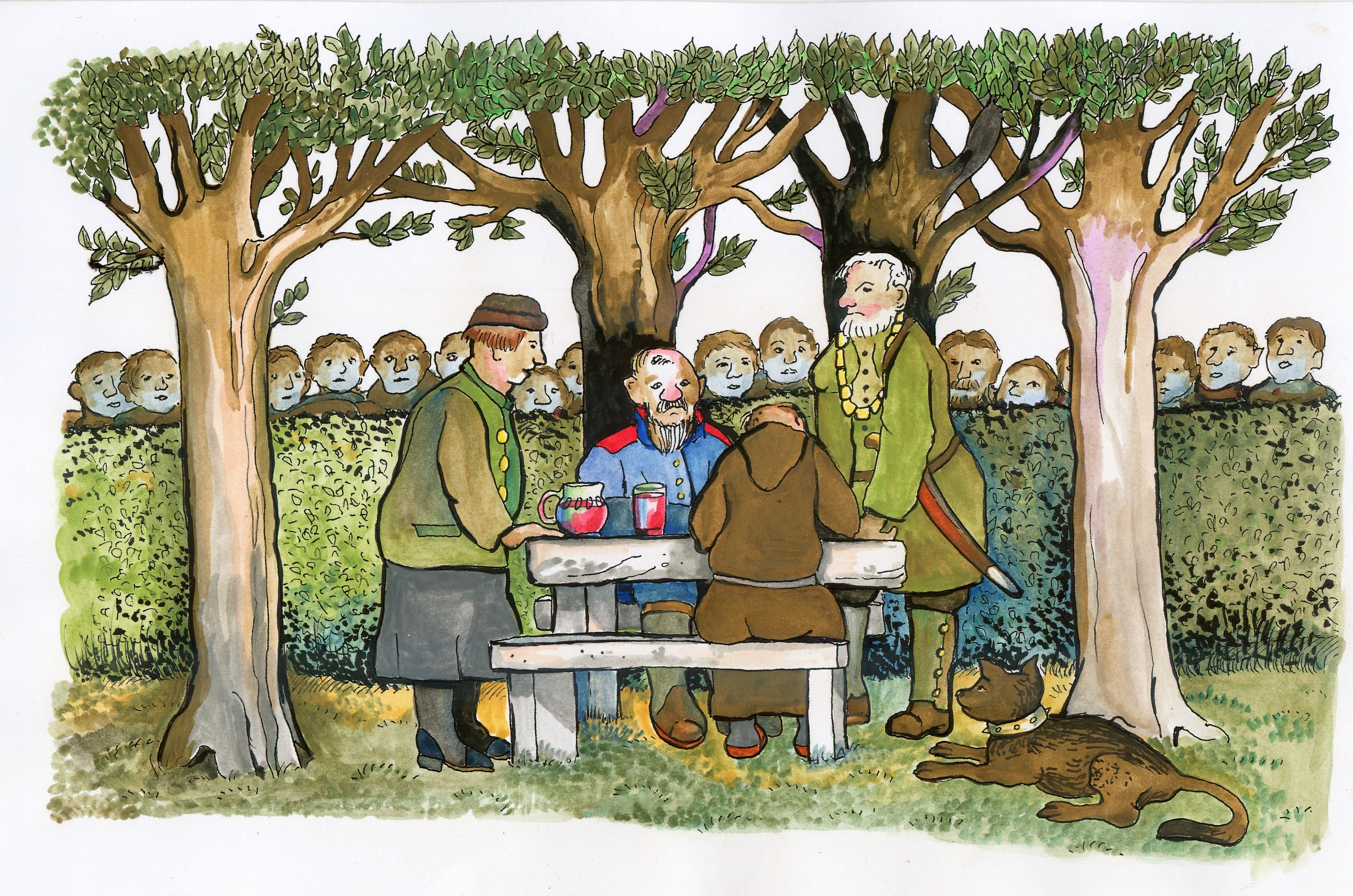 Küssaburg im Landkreis Waldshut in Baden-Württemberg. Historische Darstellung einer Güterübertragung im Mittelalter. Zeichnung von Wolf Pabst.